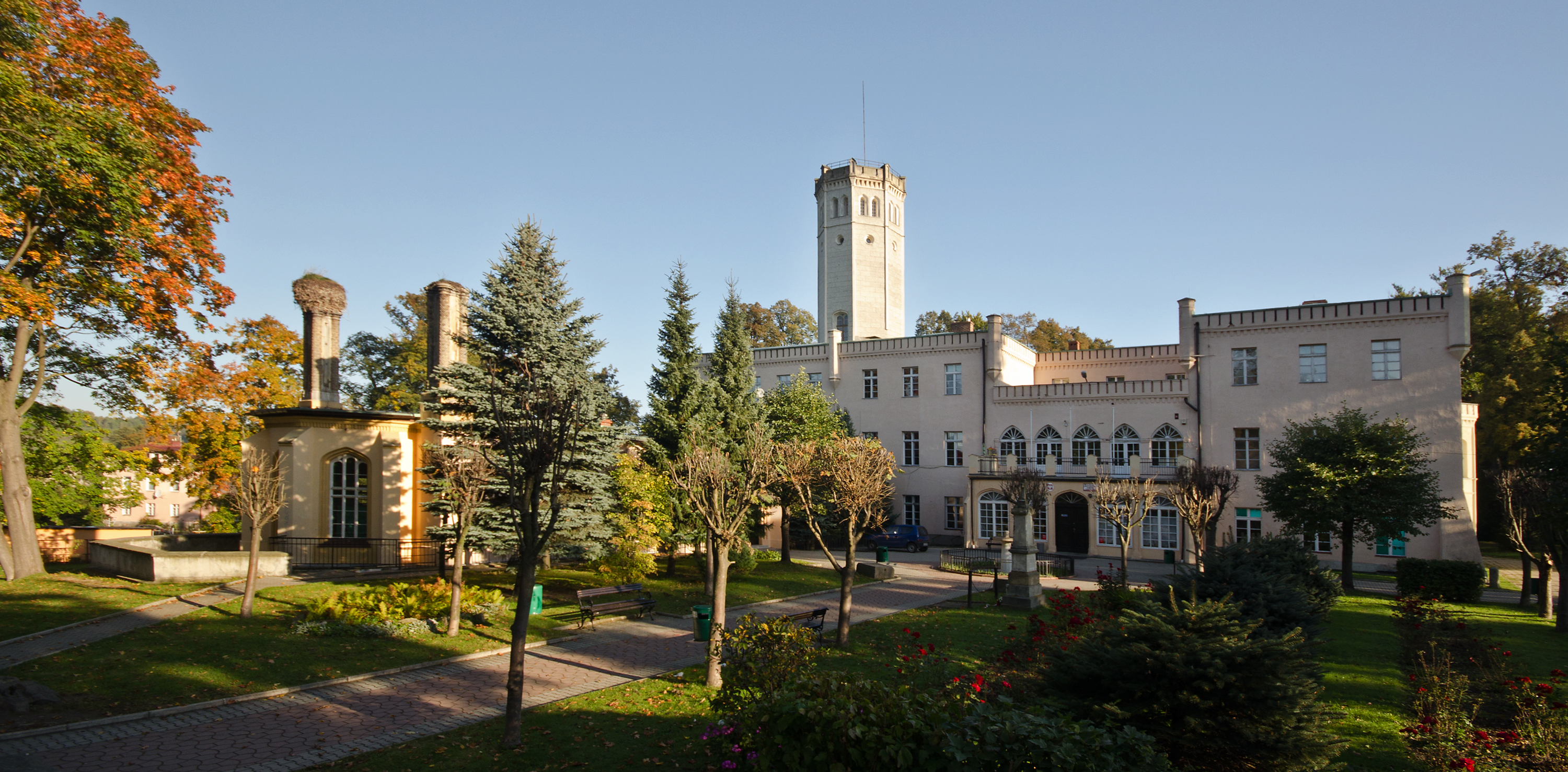 Pałac, ob. szkoła Mysłakowice, ul. Sułkowskiego 1, pow. jeleniogórski